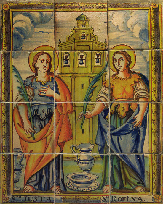 Panel cerámico de las santas Justa y Rufina del siglo XVIII, conseervado en el Museo Nacional de Cerámica y Artes Suntuarias "González Martí" de Valencia. Spain